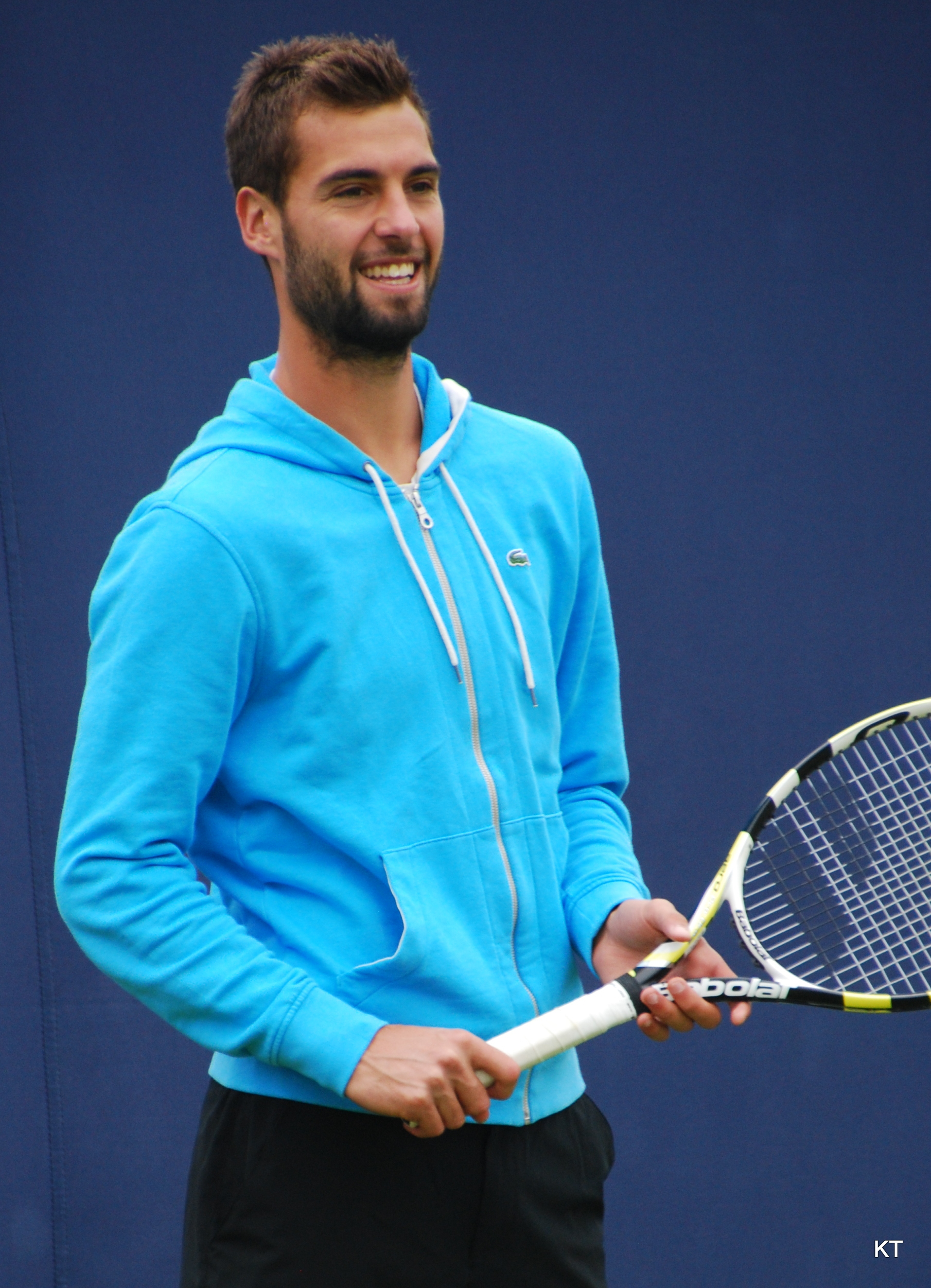 Benoit Paire